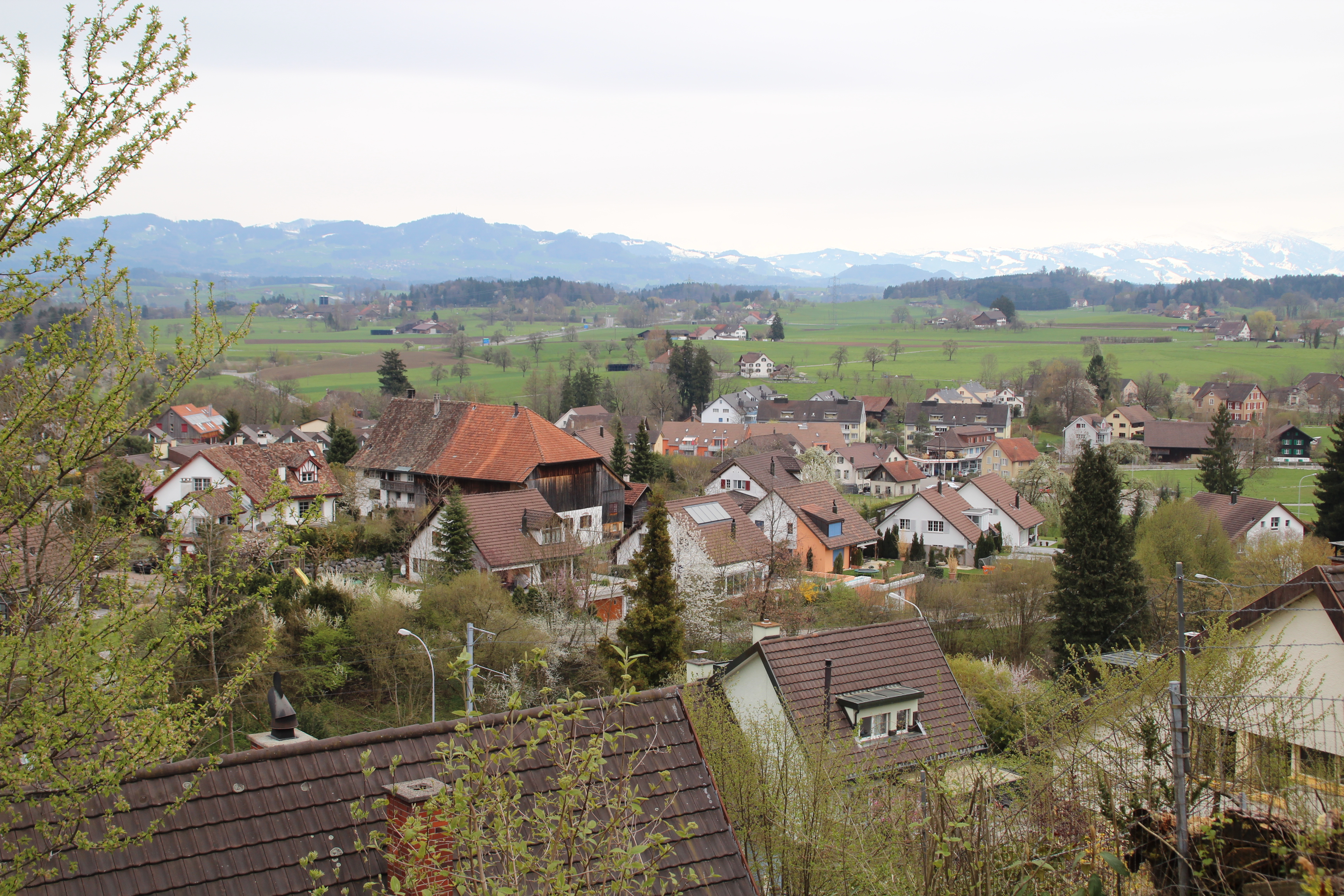 Esslingen ZH Blick nach Südosten